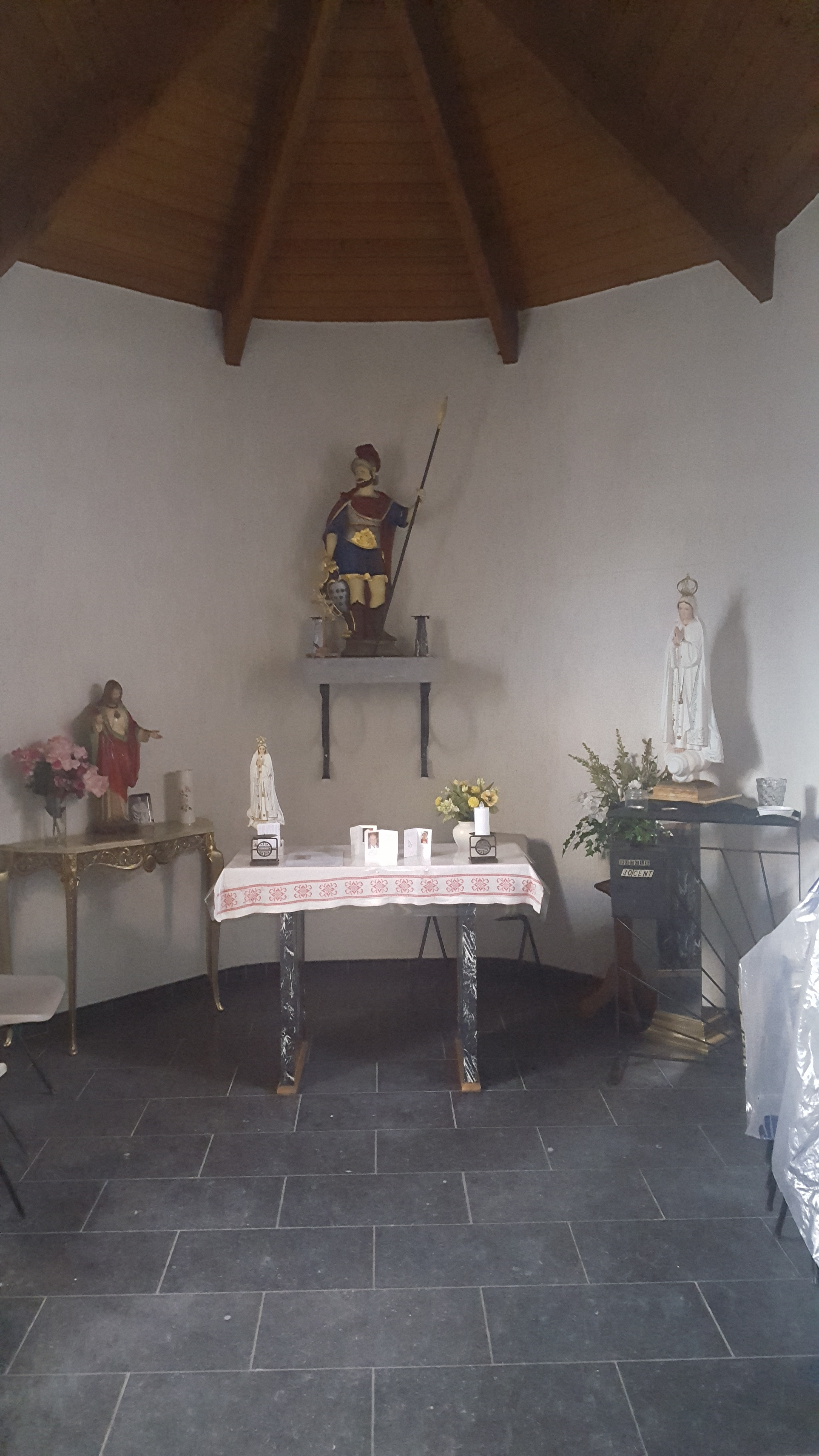 Chapelle St Quirin, Membach, Baelen, Belgique